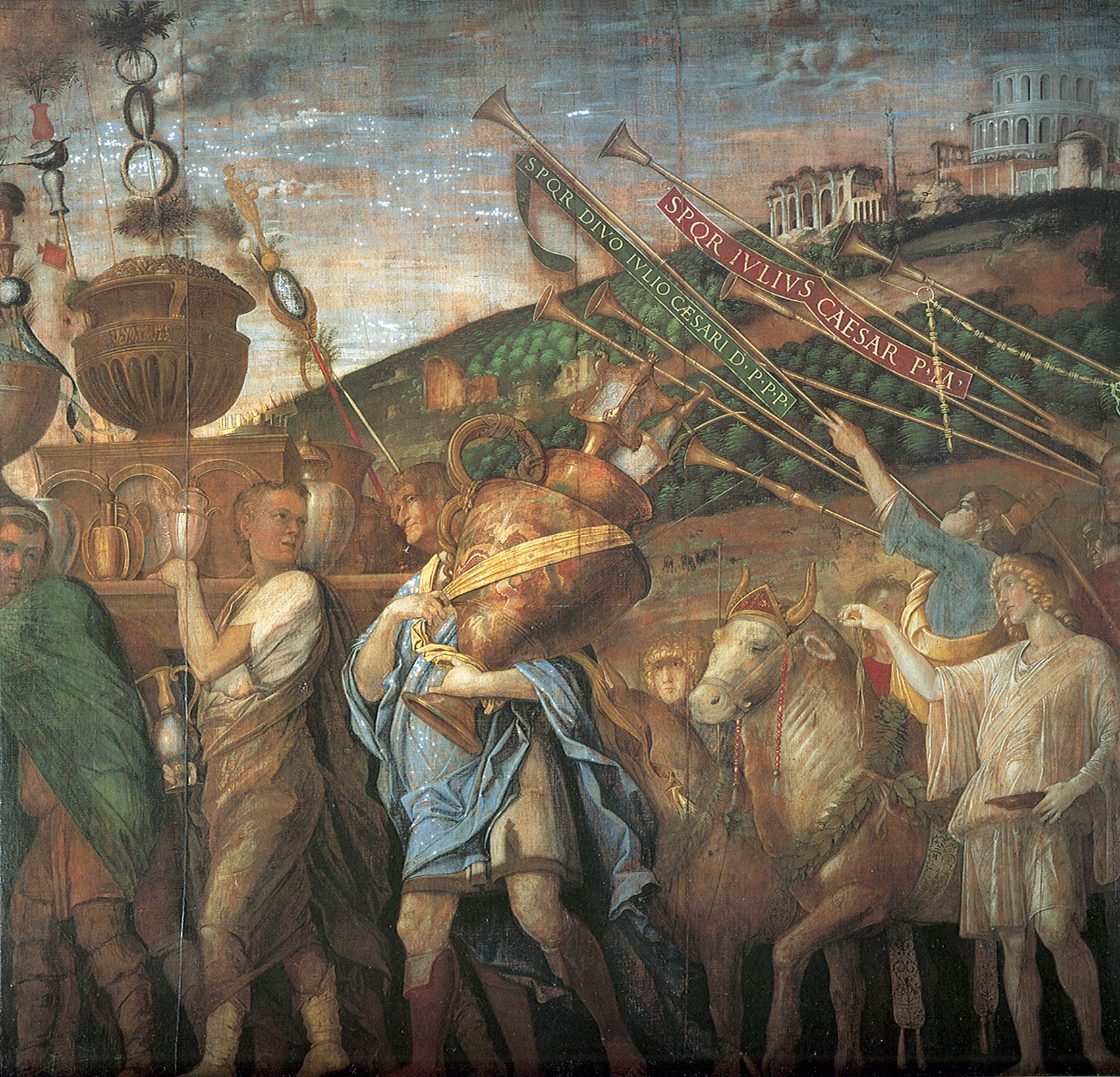 detail